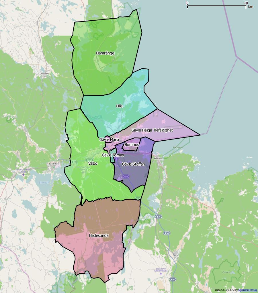 Distriktsindelningen i Gävle kommun